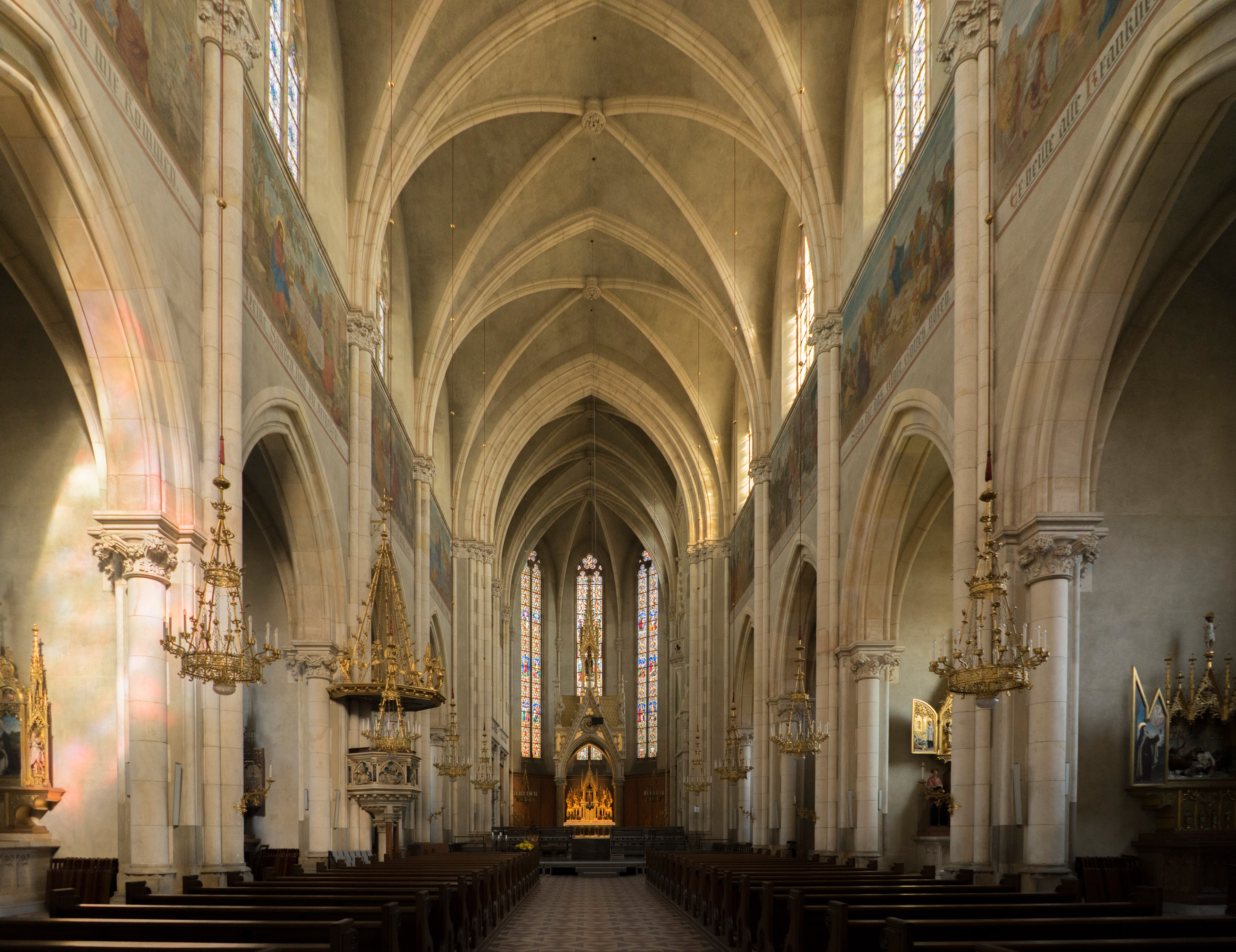 Herz-Jesu-Kirche, Graz